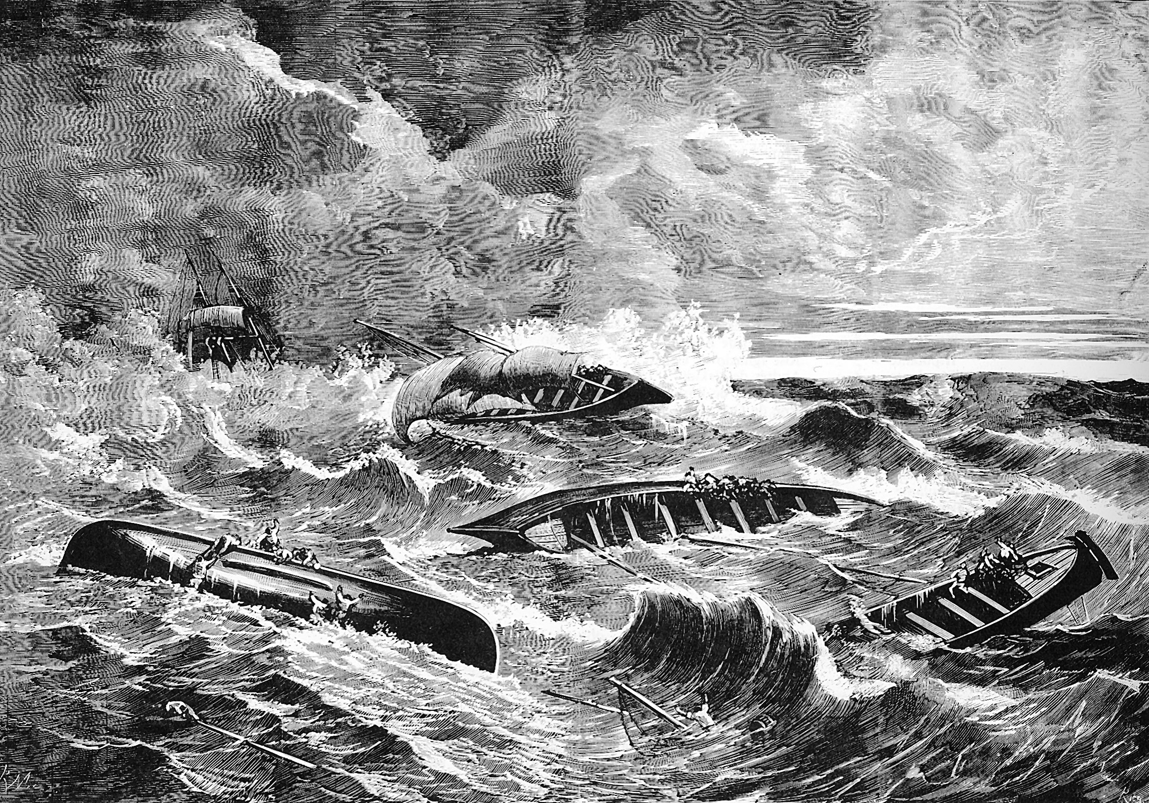 Galerna itsasontziak hondoratzen